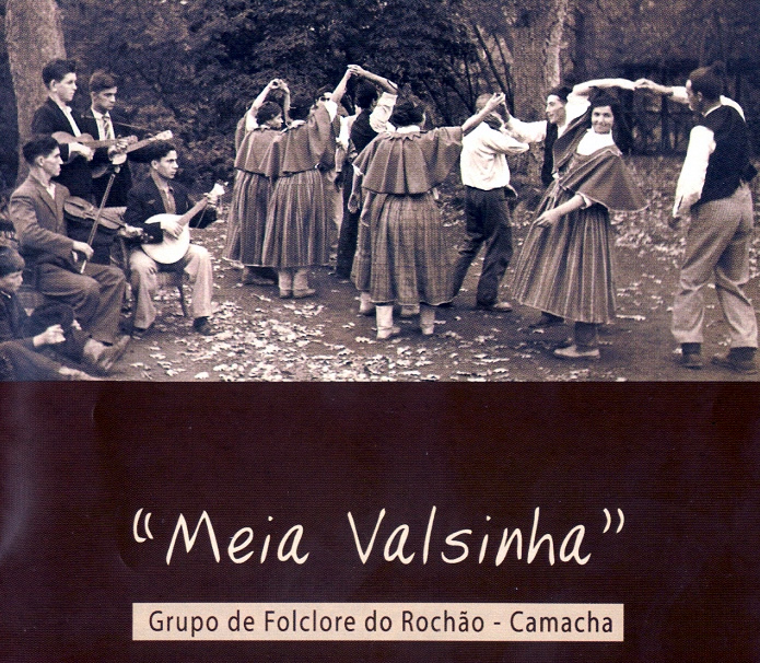 Capa do Cd de Lançamento do Grupo de Foclore do Rochão